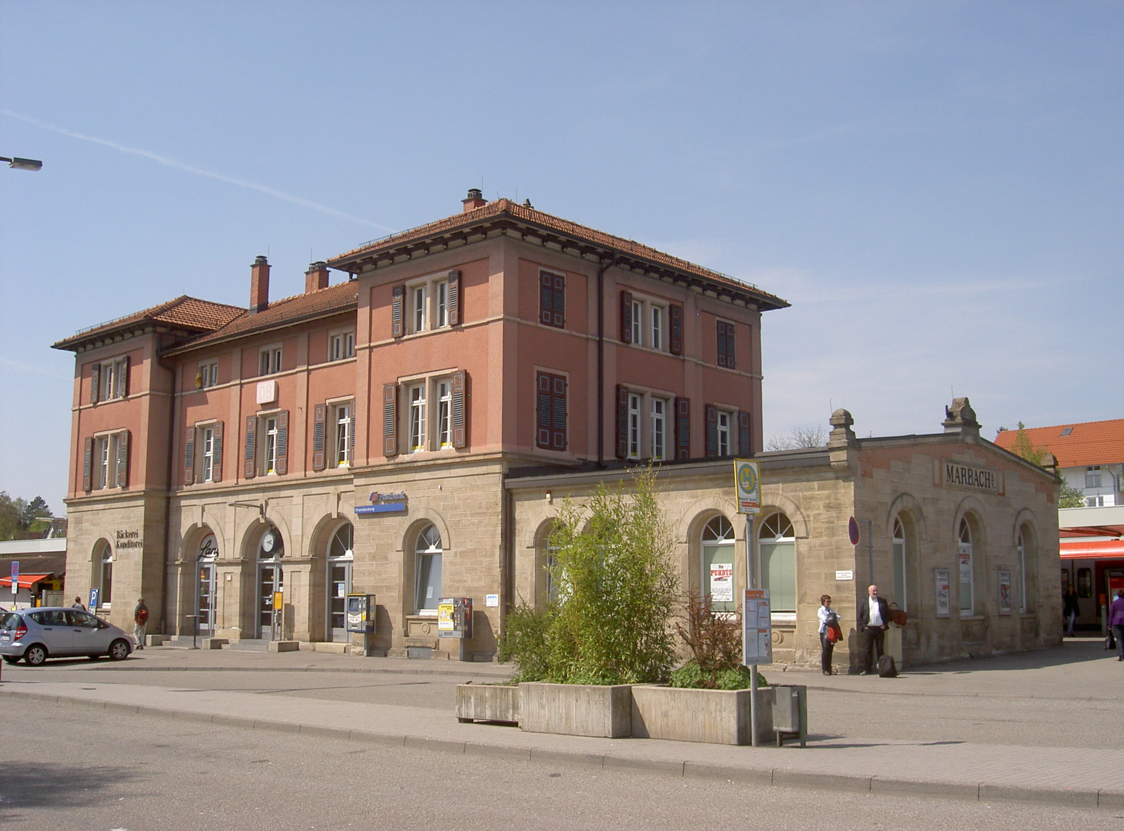 Bahnhof Marbach am Neckar